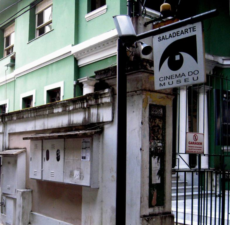 Entrada da SaladeArte Cinema do Museu